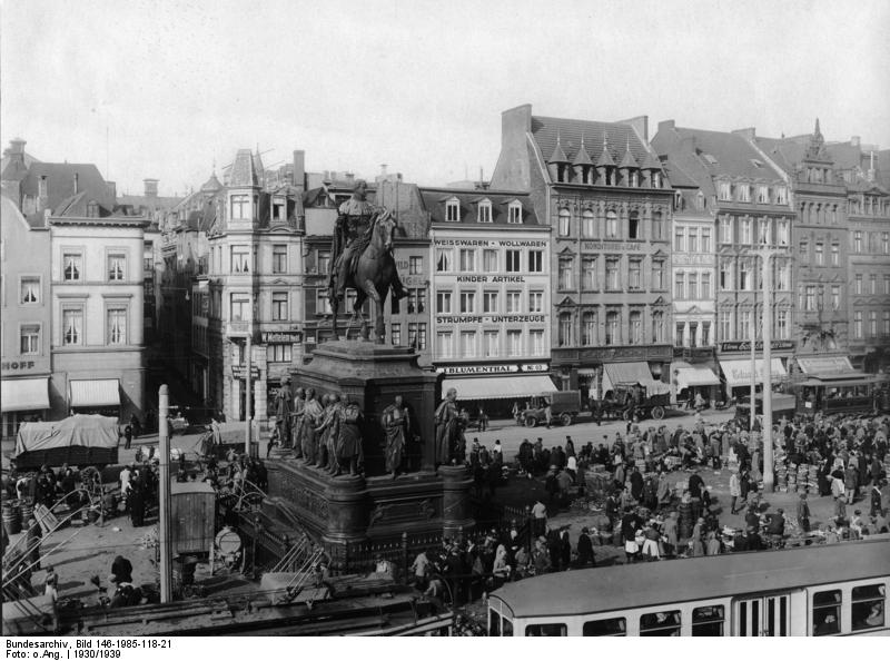 Köln, Heumarkt